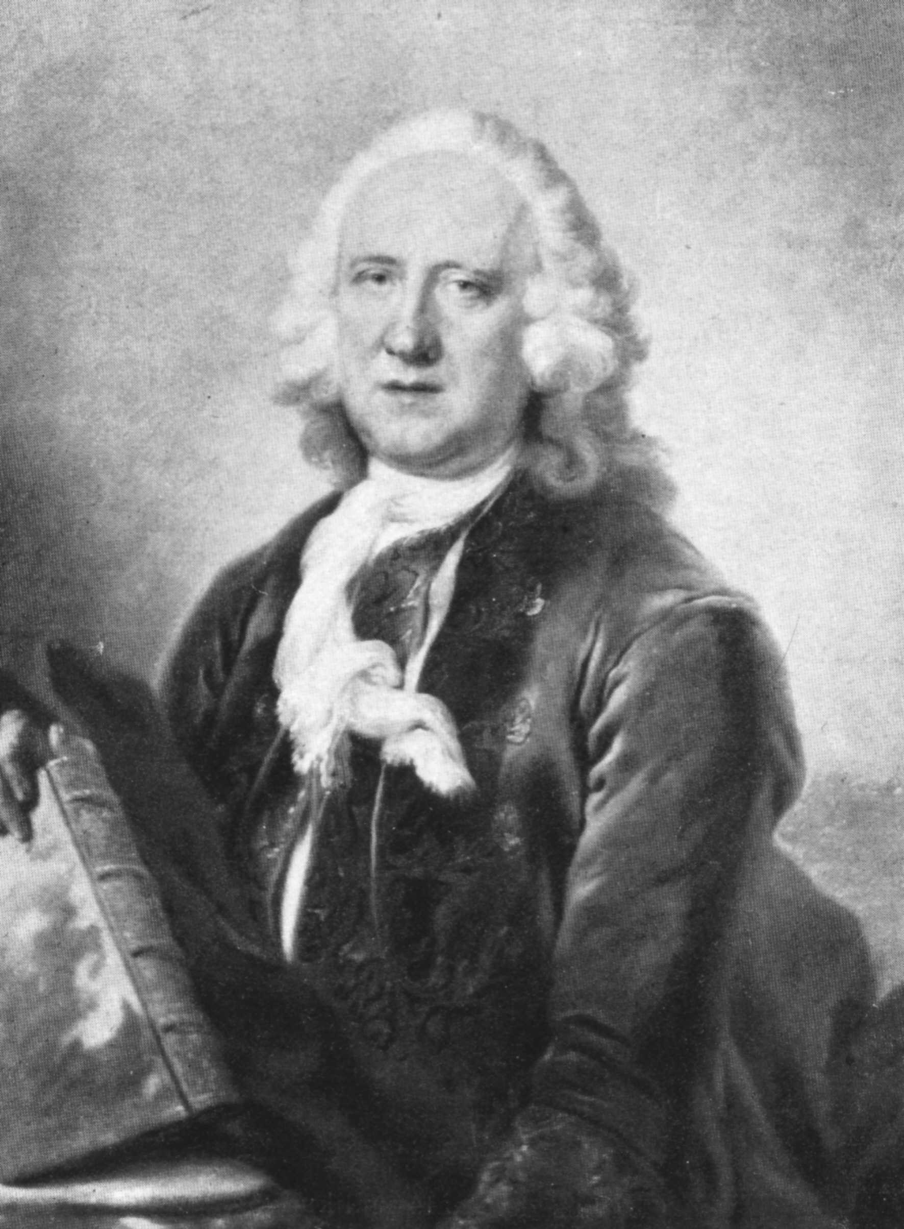 Jakob Leonhard Vogel (*14. Oktober 1694 in Lübeck; †30. Januar 1781 ebenda), Lübecker Ratschirurg